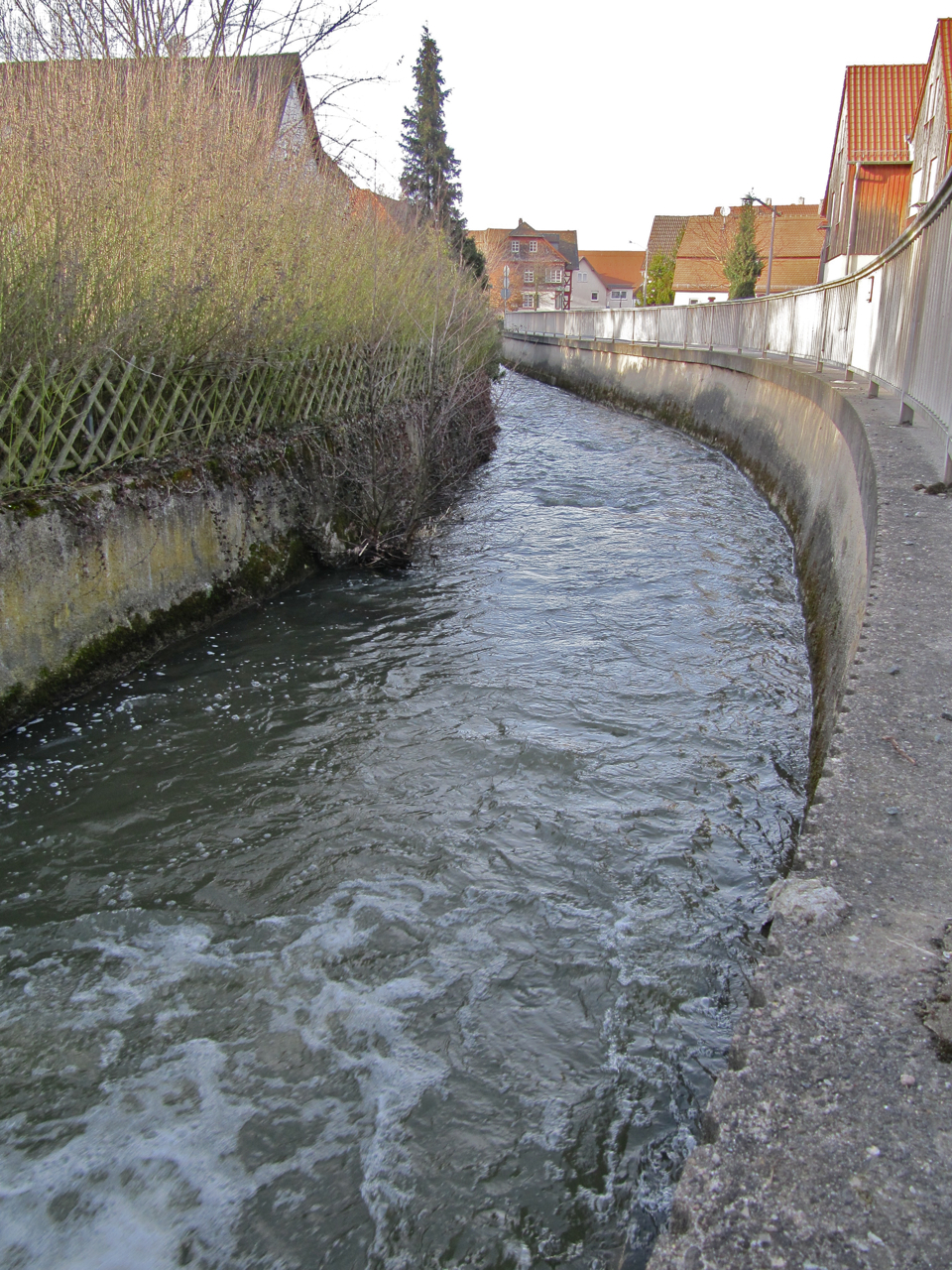 Modau-Kanal in Ober-Ramstadt.